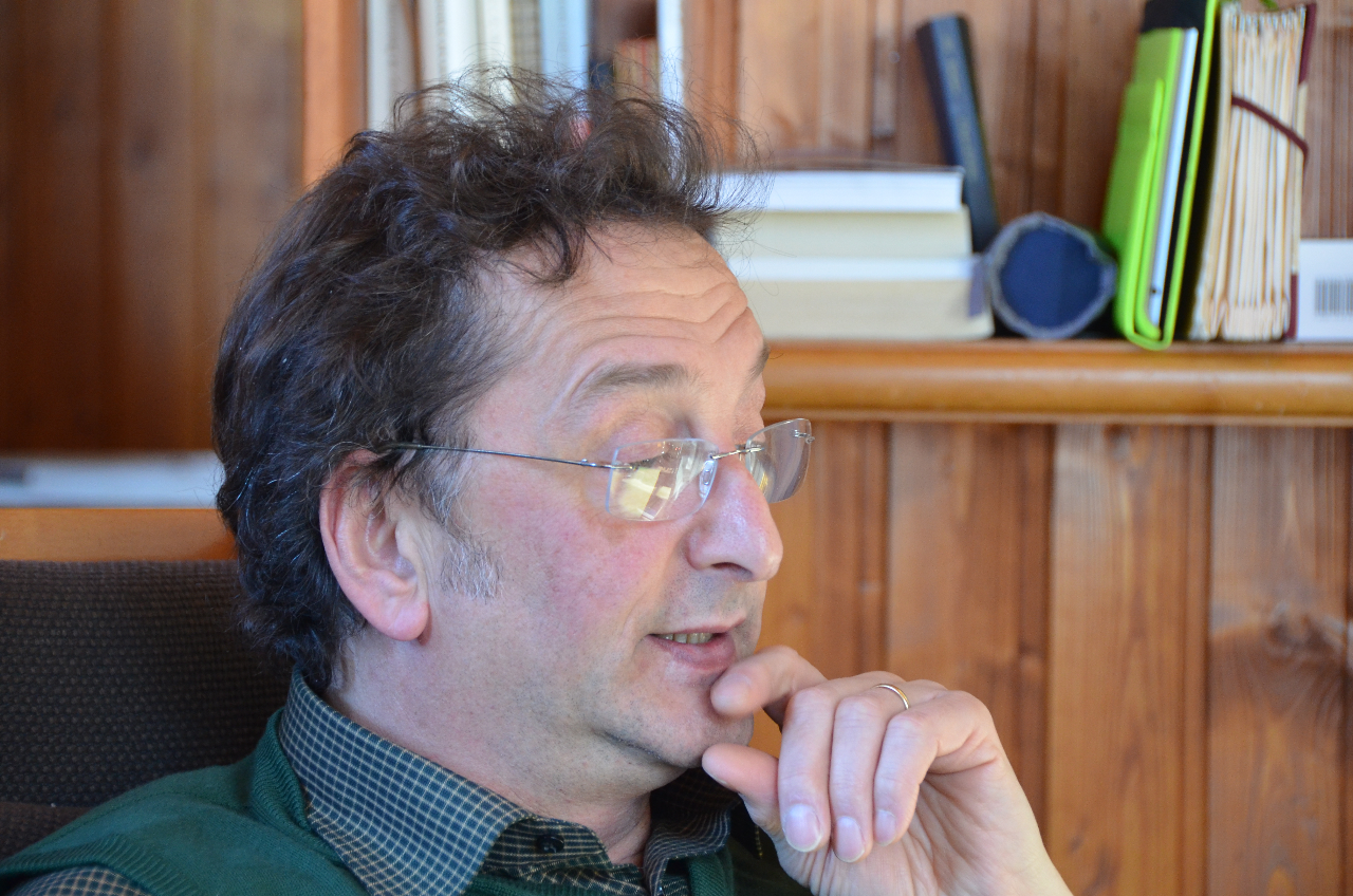 Fabio Contestabile a Ghirone, 2012